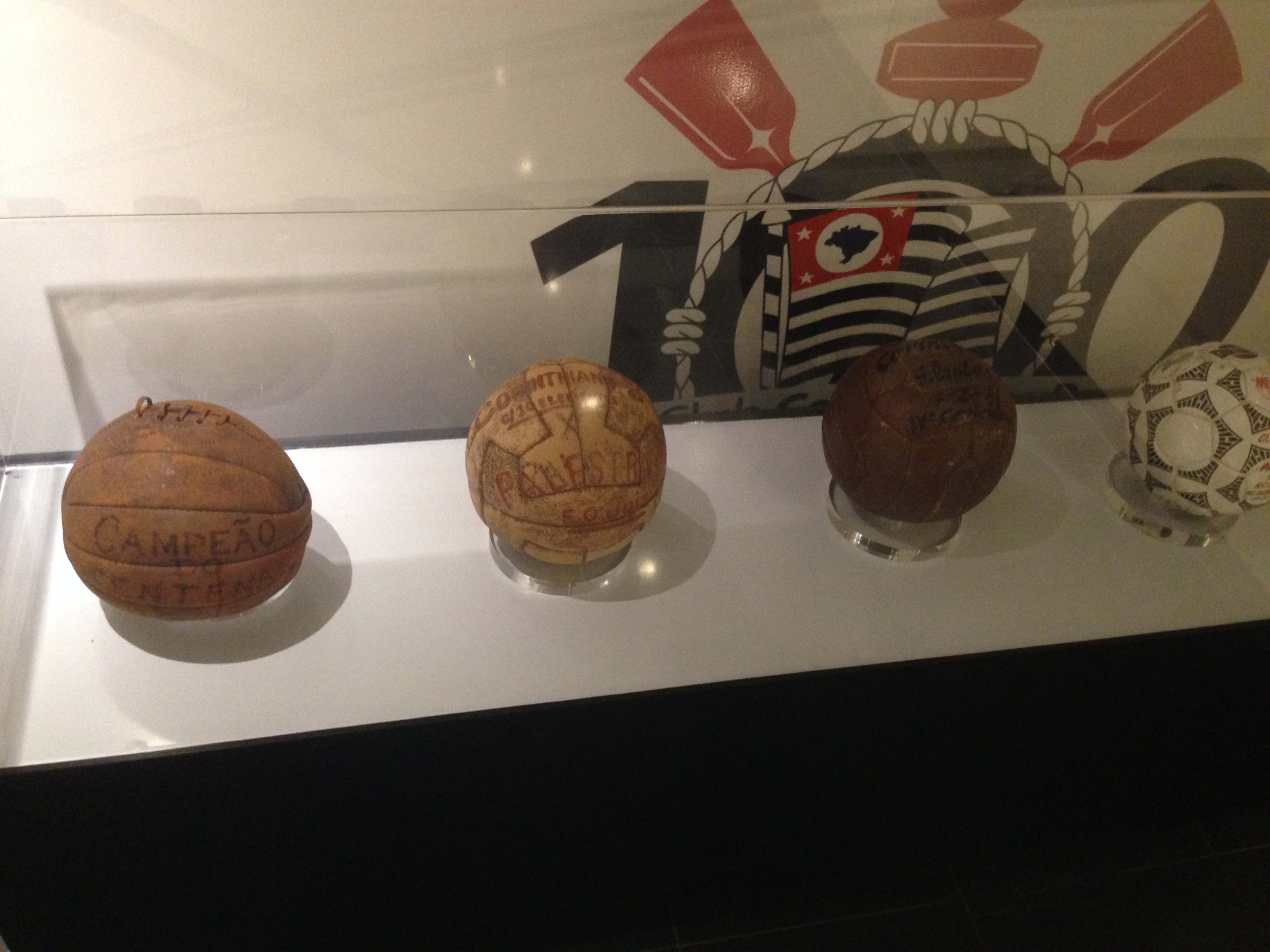 Foto tirada por mim no Memorial do Corinthians